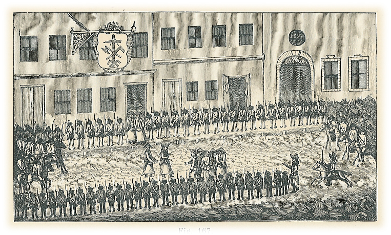 De strejkende tømrersvende føres efter deres arrestation fra deres herbeg af politi og militær til Kastellet. Radering fra 1794.